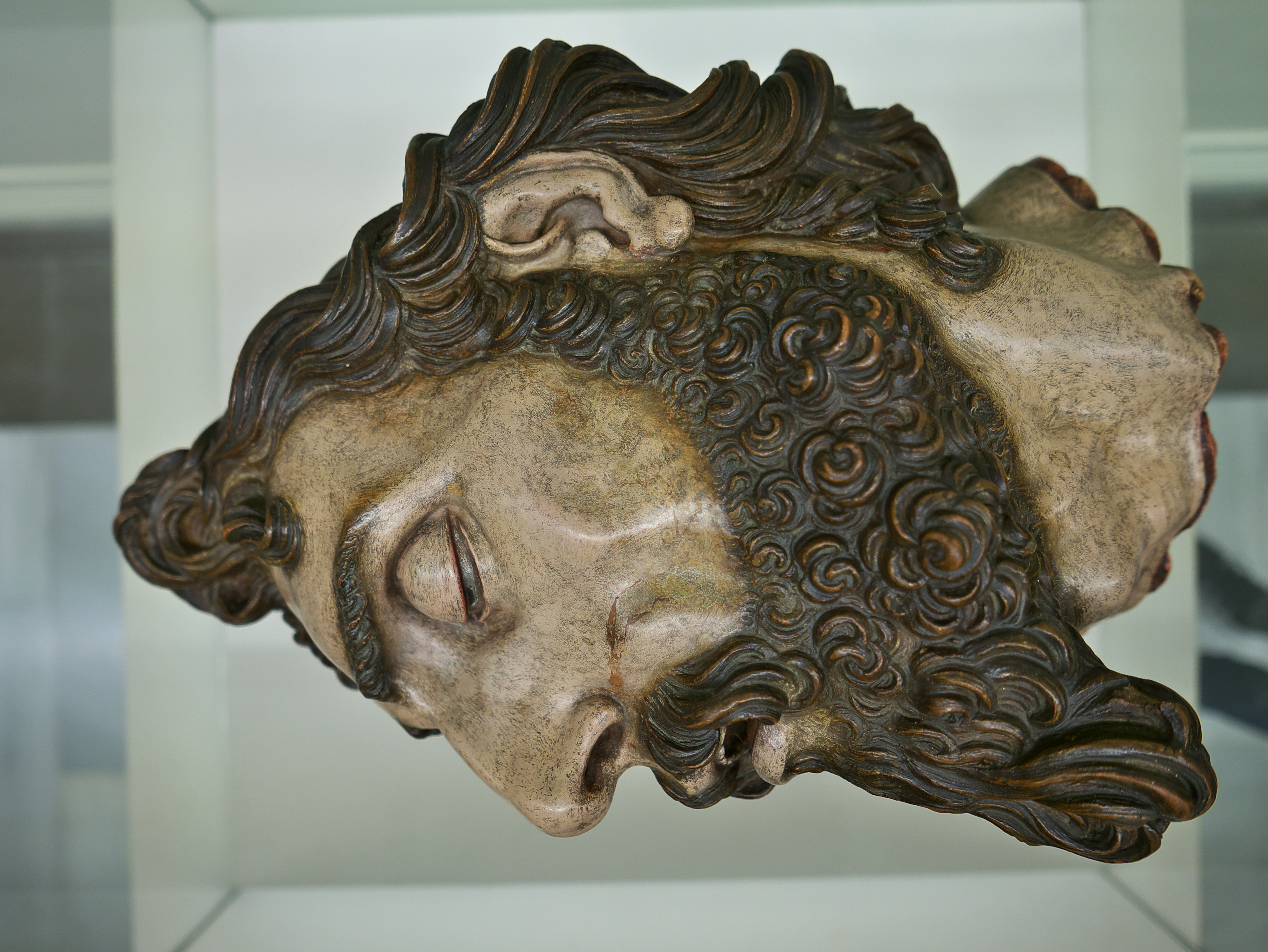 Museo de Bellas Artes de Sevilla. Perfil de la cabeza de San Juan Bautista, Gaspar Núñez Delgado (1591), arcilla policromada. Cabeza de San Juan Bautista